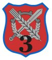 Odznaka rozpoznawcza 3 Batalionu Logistycznego w Goleniowie